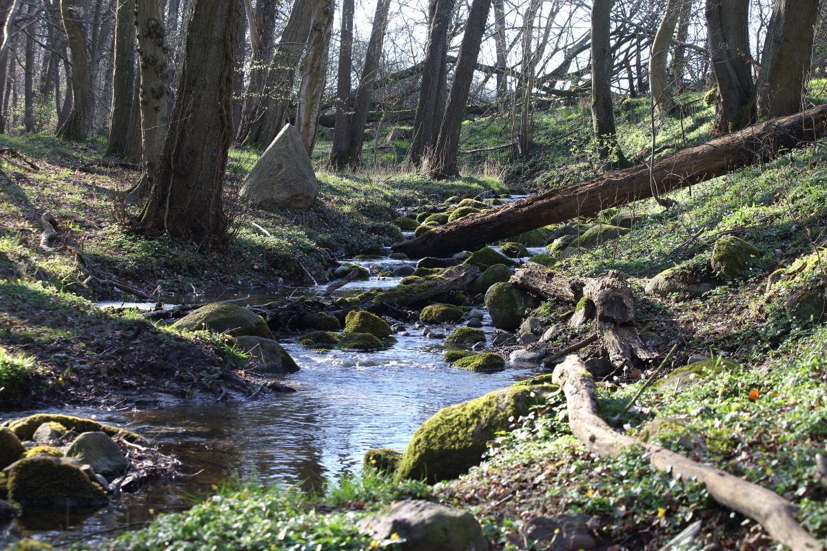 Bach in Burgtal bei Rambow